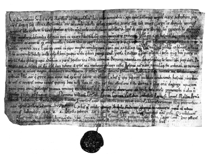 Zakládací listina litoměřiské kapituly